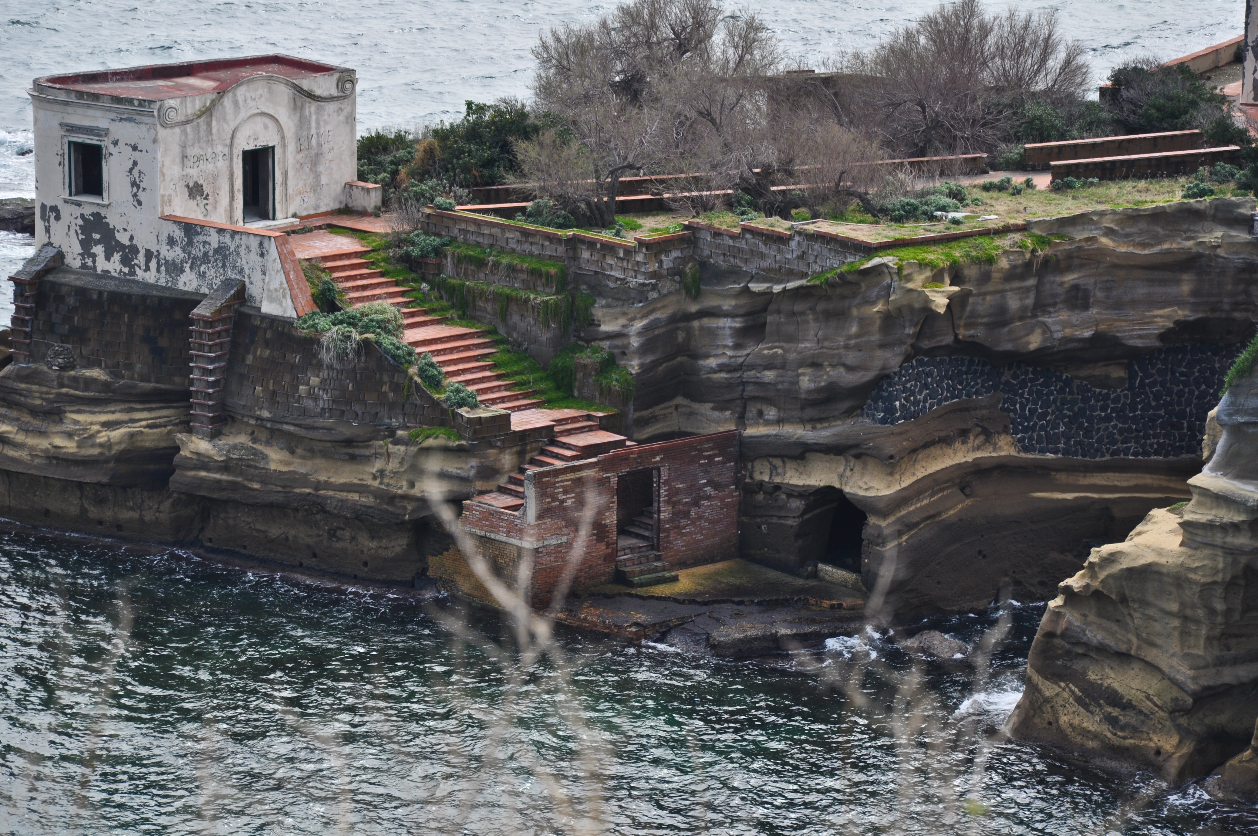 Parco archeologico del Pausilypon, Napoli